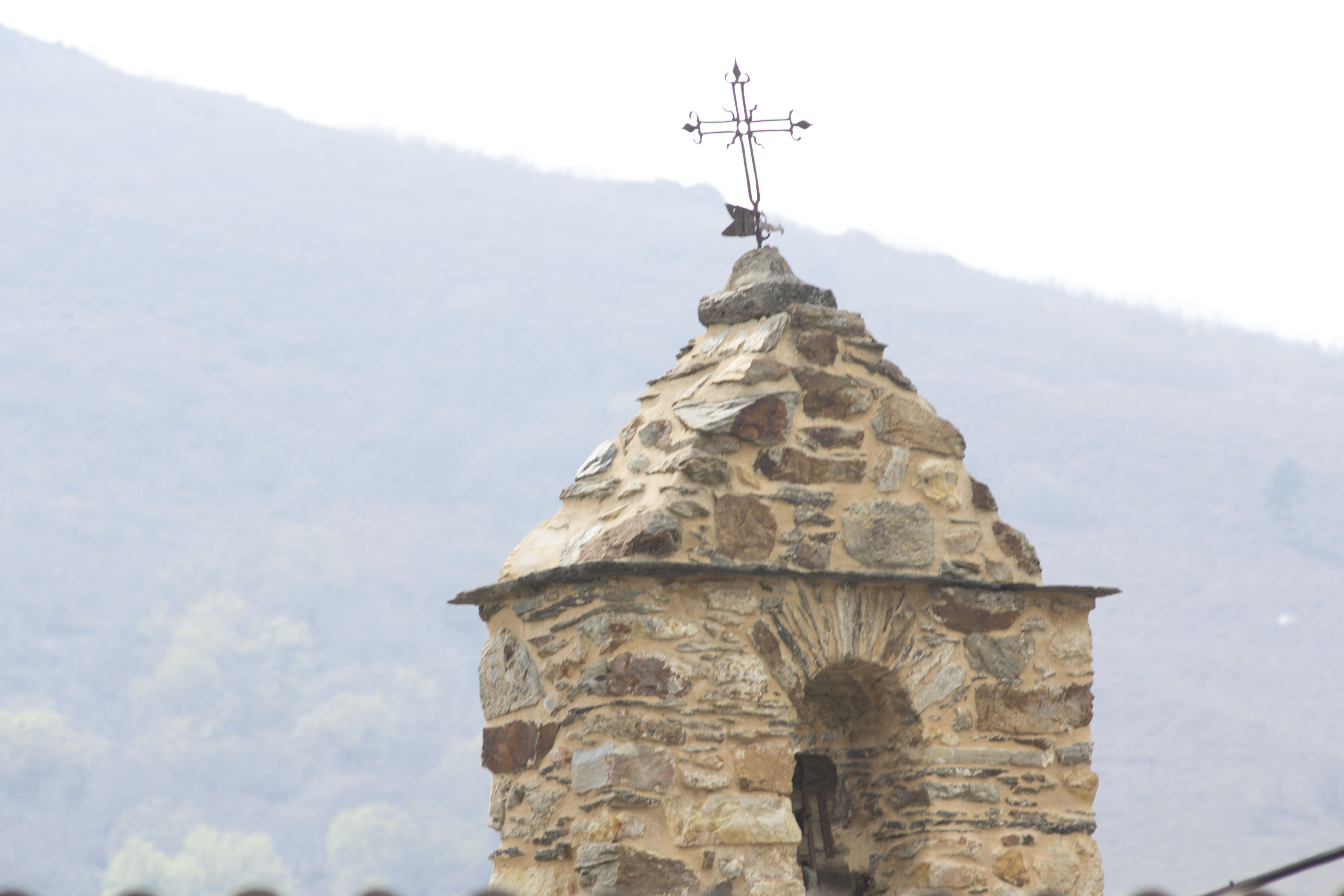 Campanario de la ermita Santo Cristo de la Piedad